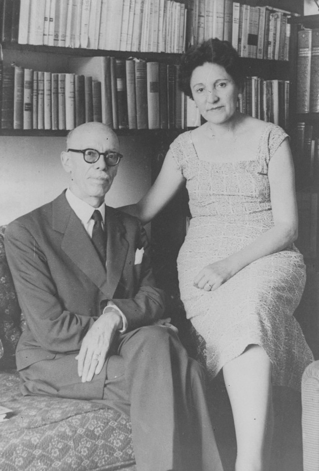 El presidente de la República del Ecuador, Dr. José María Velasco Ibarra y su esposa, la compositora y poetisa argentina Corina del Parral, alrededor del año 1940.